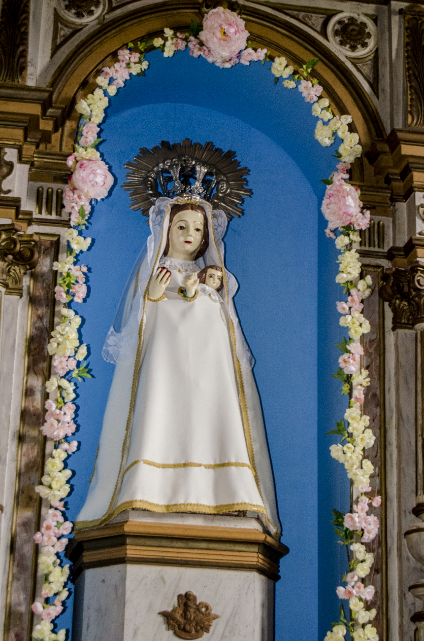 Celadilla-Sotobrín. Vírgen de Sotobrín.